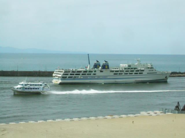 佐渡汽船 カーフェリー「おおさど丸」、ジェットフォイル「すいせい」（山の下みなとタワーより撮影）